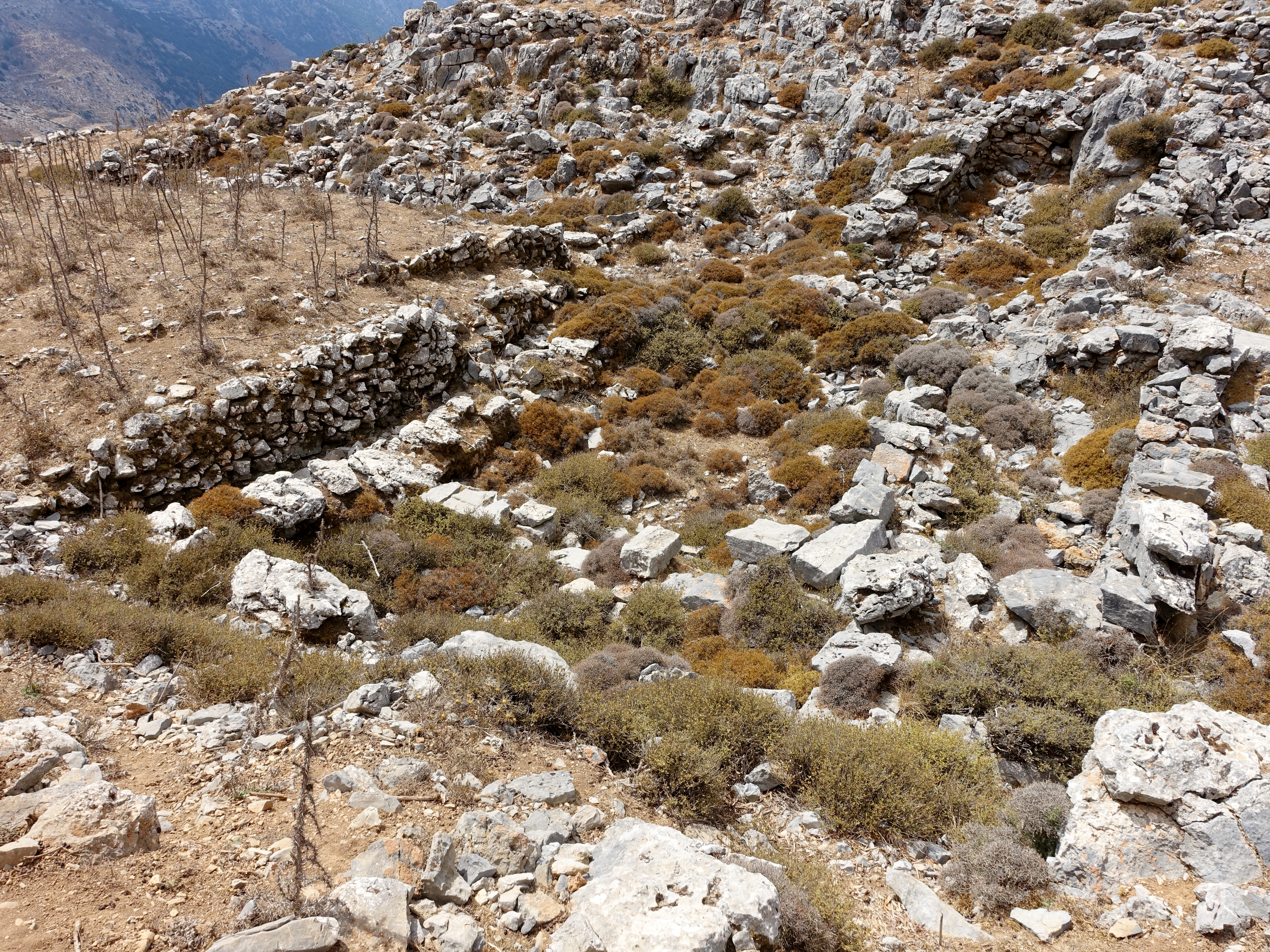 Ausgrabungsstätte der Siedlung Karphi, Kreta, Griechenland